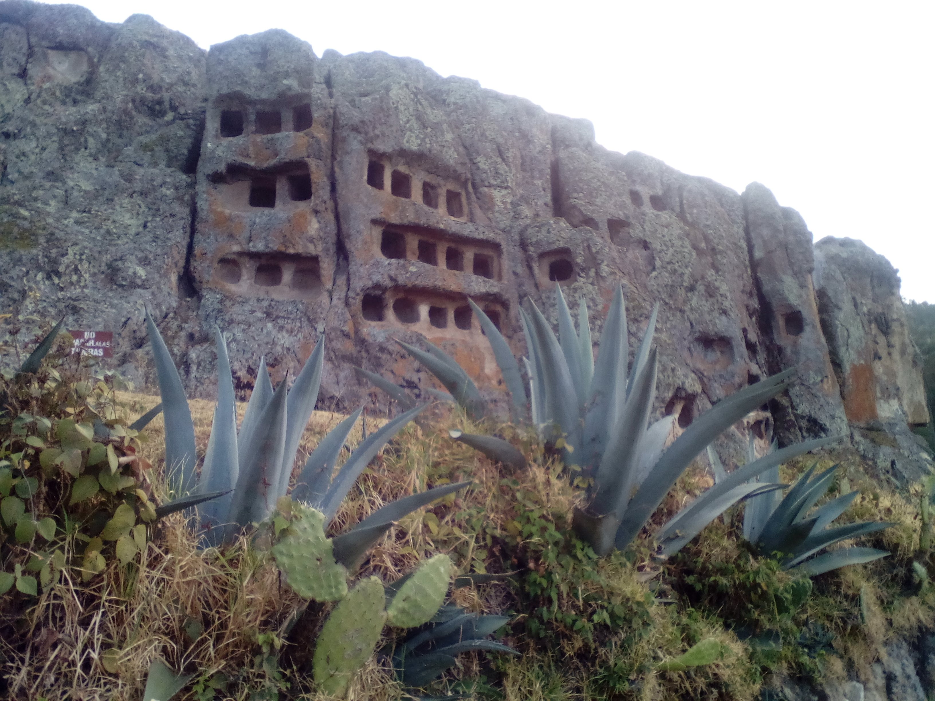 Ventanillas de Otuzco